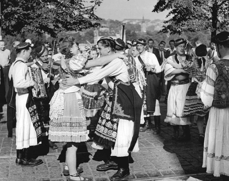 Prag, Weltfestspiele, Gruppe aus Böhmen ADN-ZB CTK-2.6.72 Prag:Erste Weltfestspiele der Jugend und Studenten-Musik und Tanz beherrschten Prag im Juli und August 1947, als hier die 1.Weltfestspiele der Jugend und Studenten stattfanden.